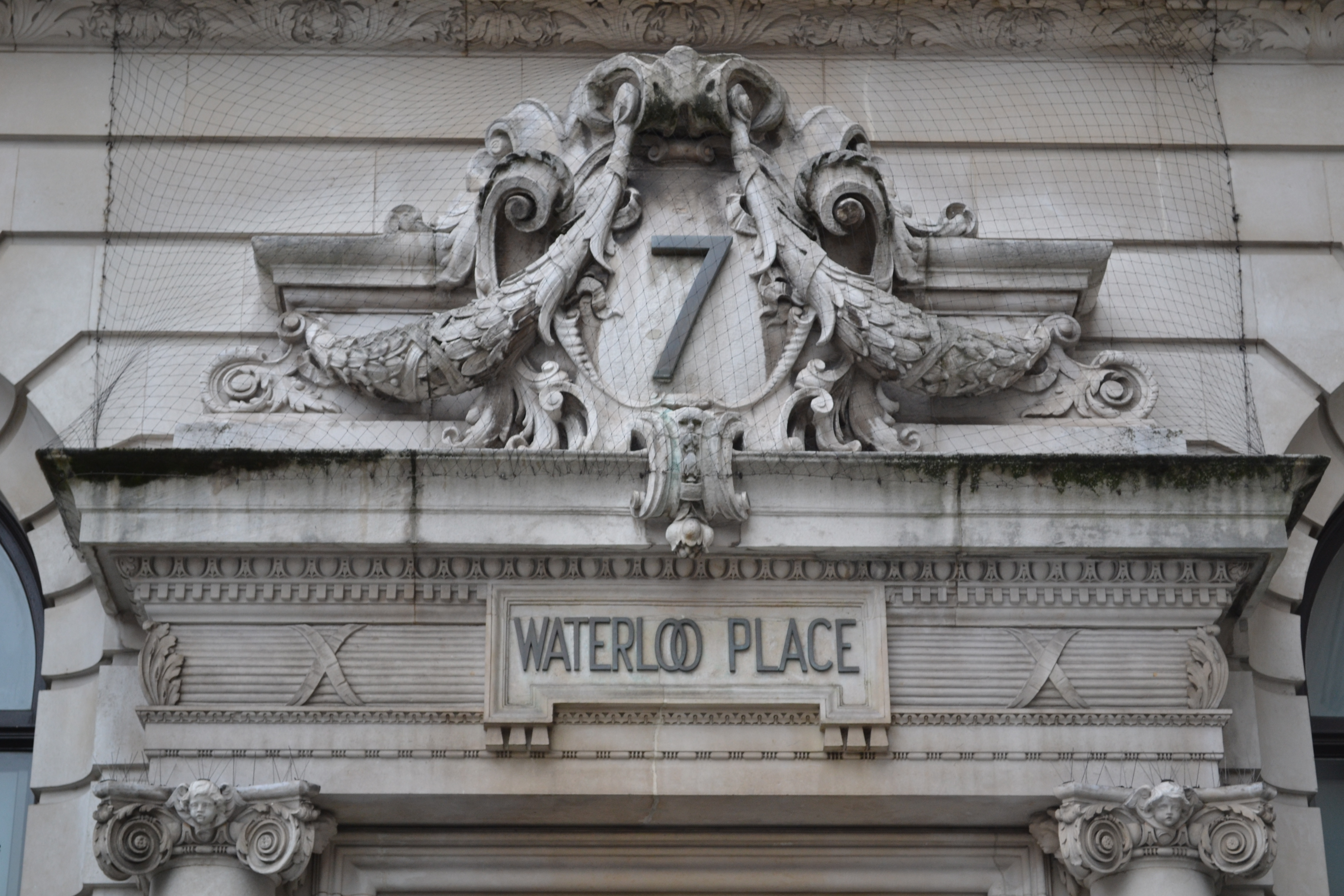 Détail de l'entrée du 7 Waterloo Place (Londres).